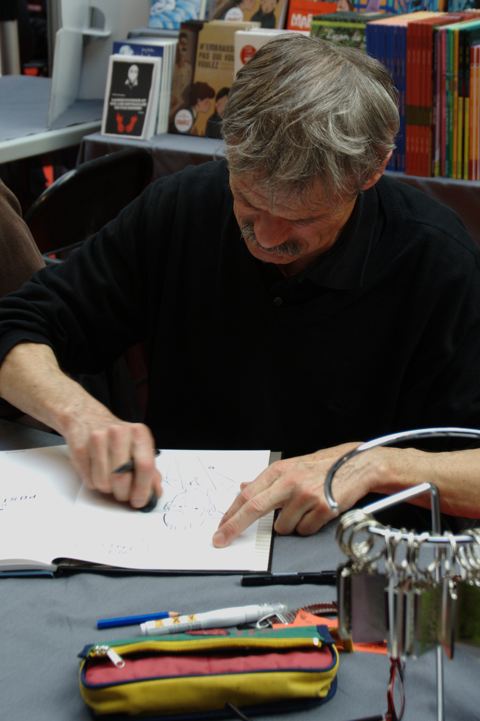 Alain Dodier lors de Quai des Bulles à Saint-Malo le 27 octobre 2012.